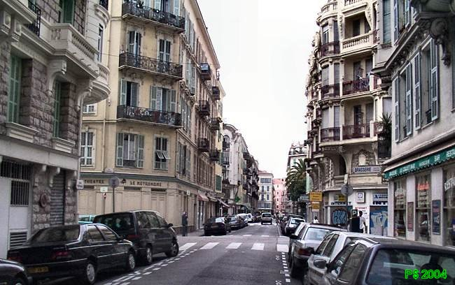 18 Rue Pertinax, vue W en direction de l'avenue Jean-Medecin.